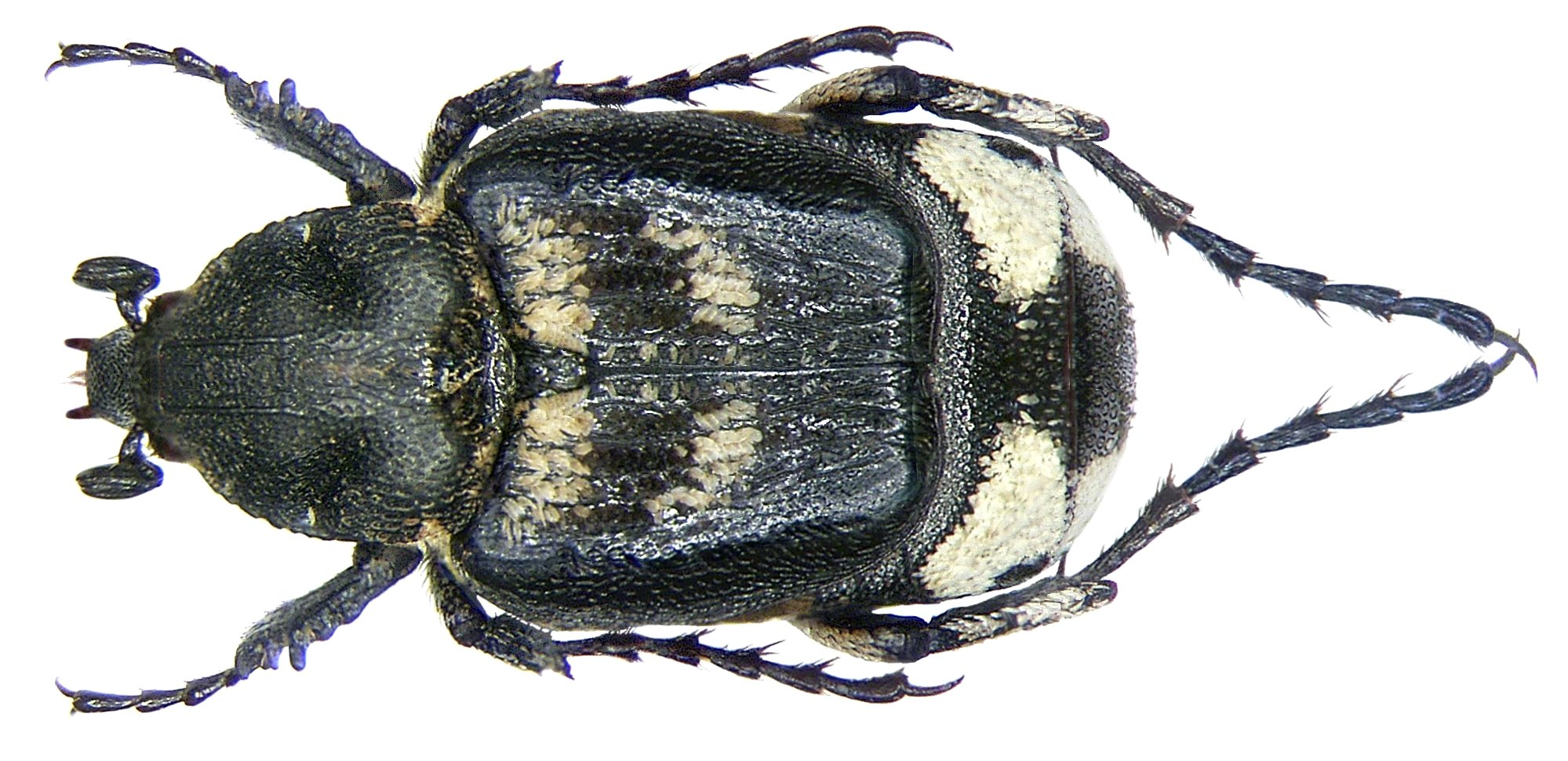 Familie: Scarabaeidae Groesse: 7,5 mm Fundort: Türkei, Prov. Antalya, Gündogmus leg. A.Skale, 2006; det. Roessner Foto: U.Schmidt, 2006